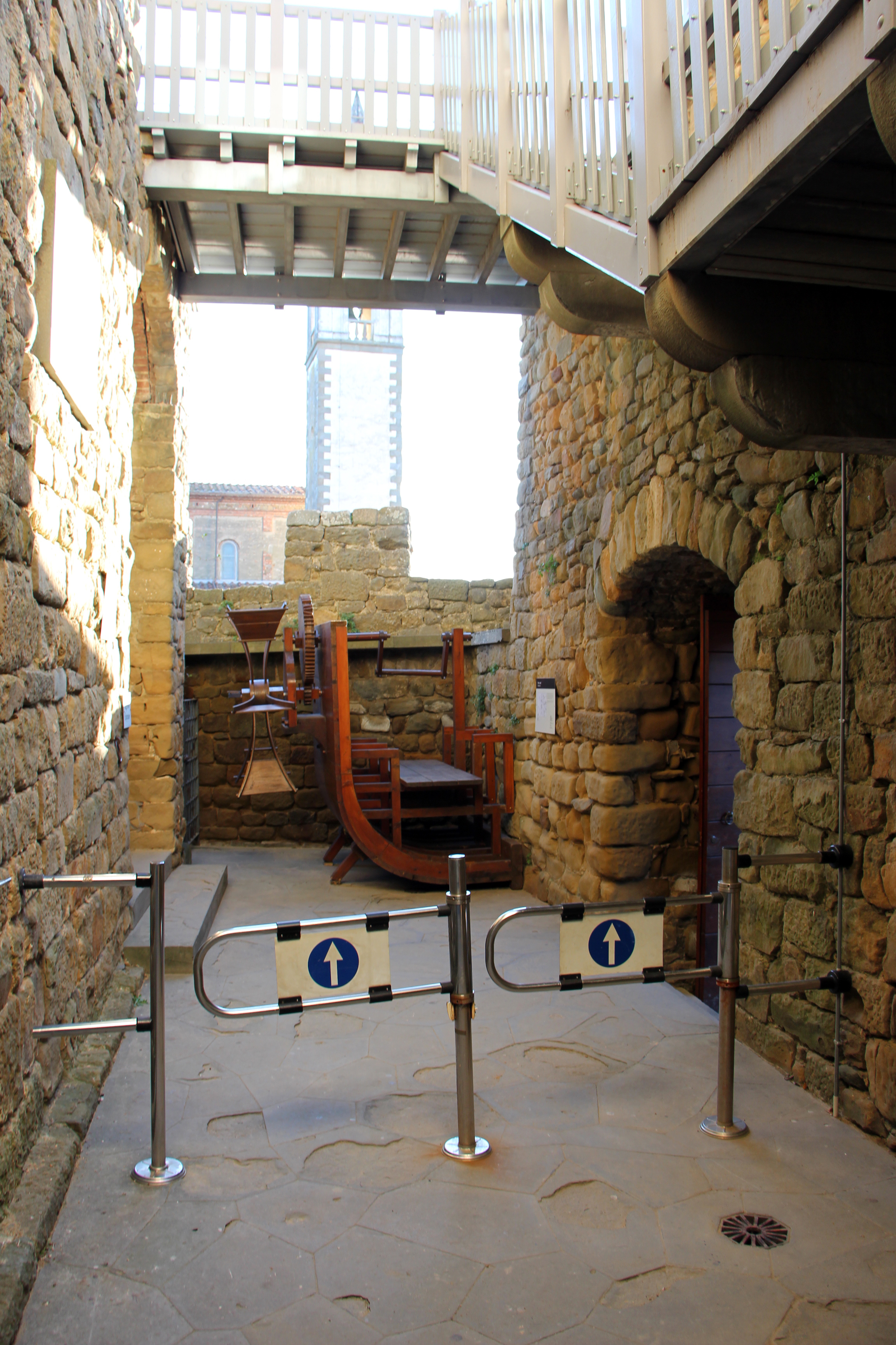 Museo Leonardiano (Vinci)